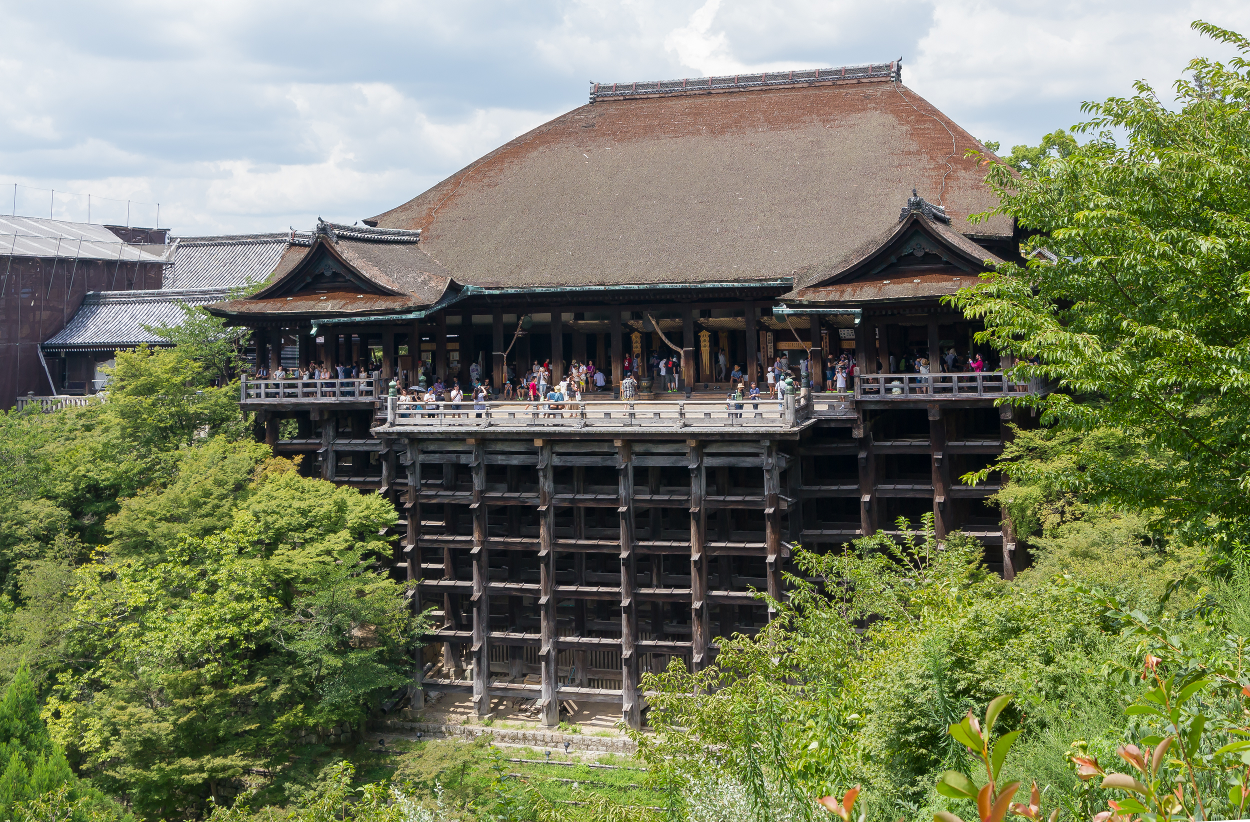 清水寺 - 本堂（国宝）